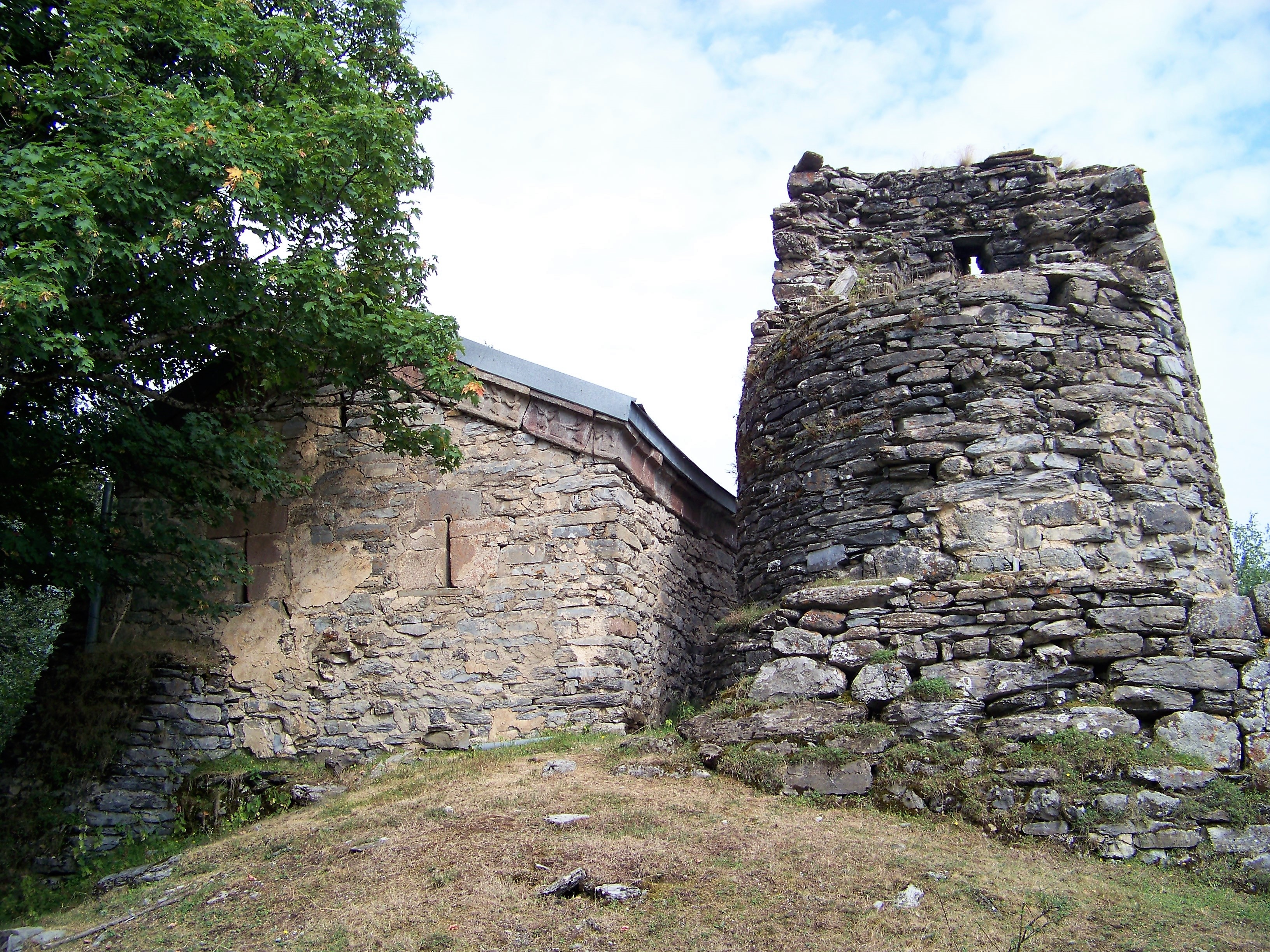 ღვთისმშობლის დარბაზული ეკლესია